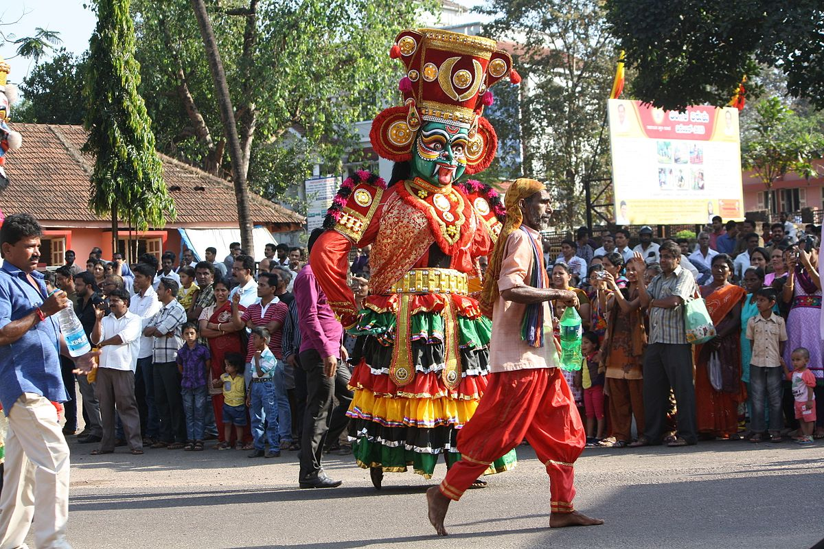 यक्षागान केरल का प्रसिद लोकनाटय है।